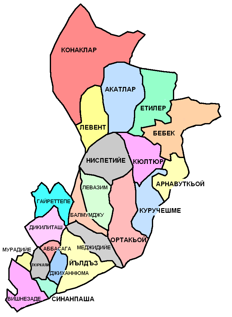 [1] kaynağından yararlandım ama kendim yaptım.